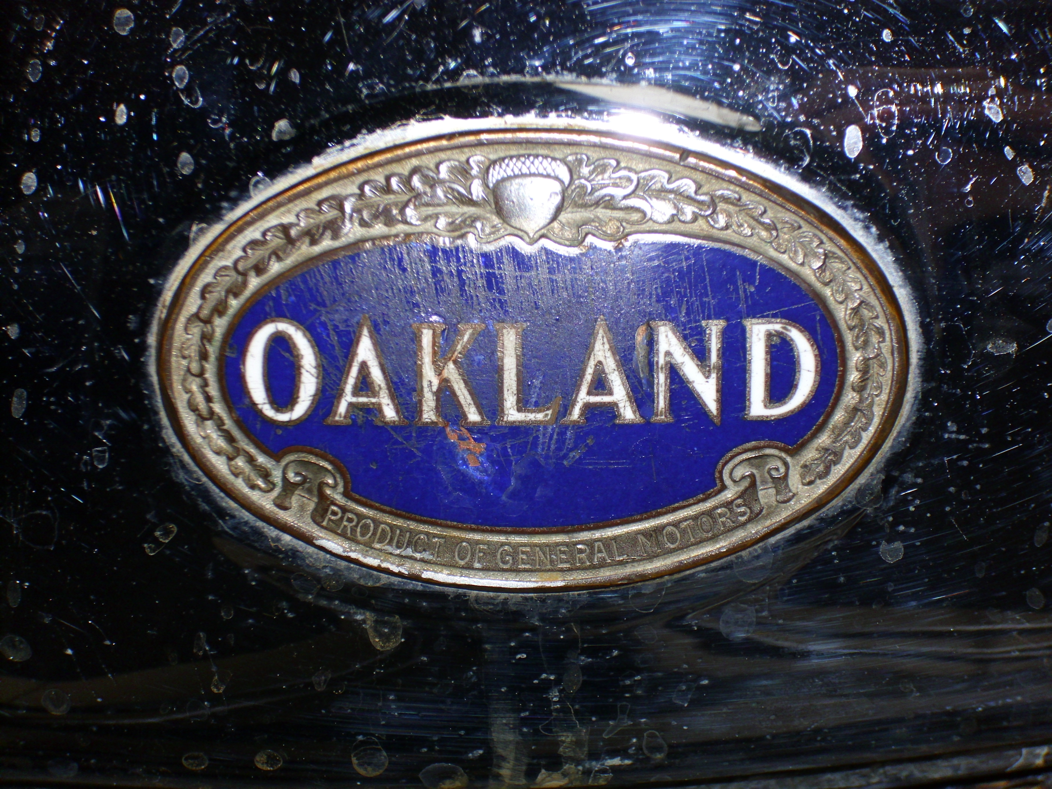 Emblem Oakland